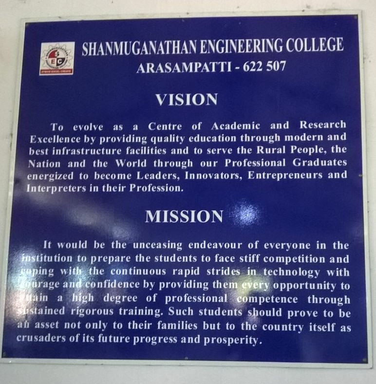 குறிக்கோள்